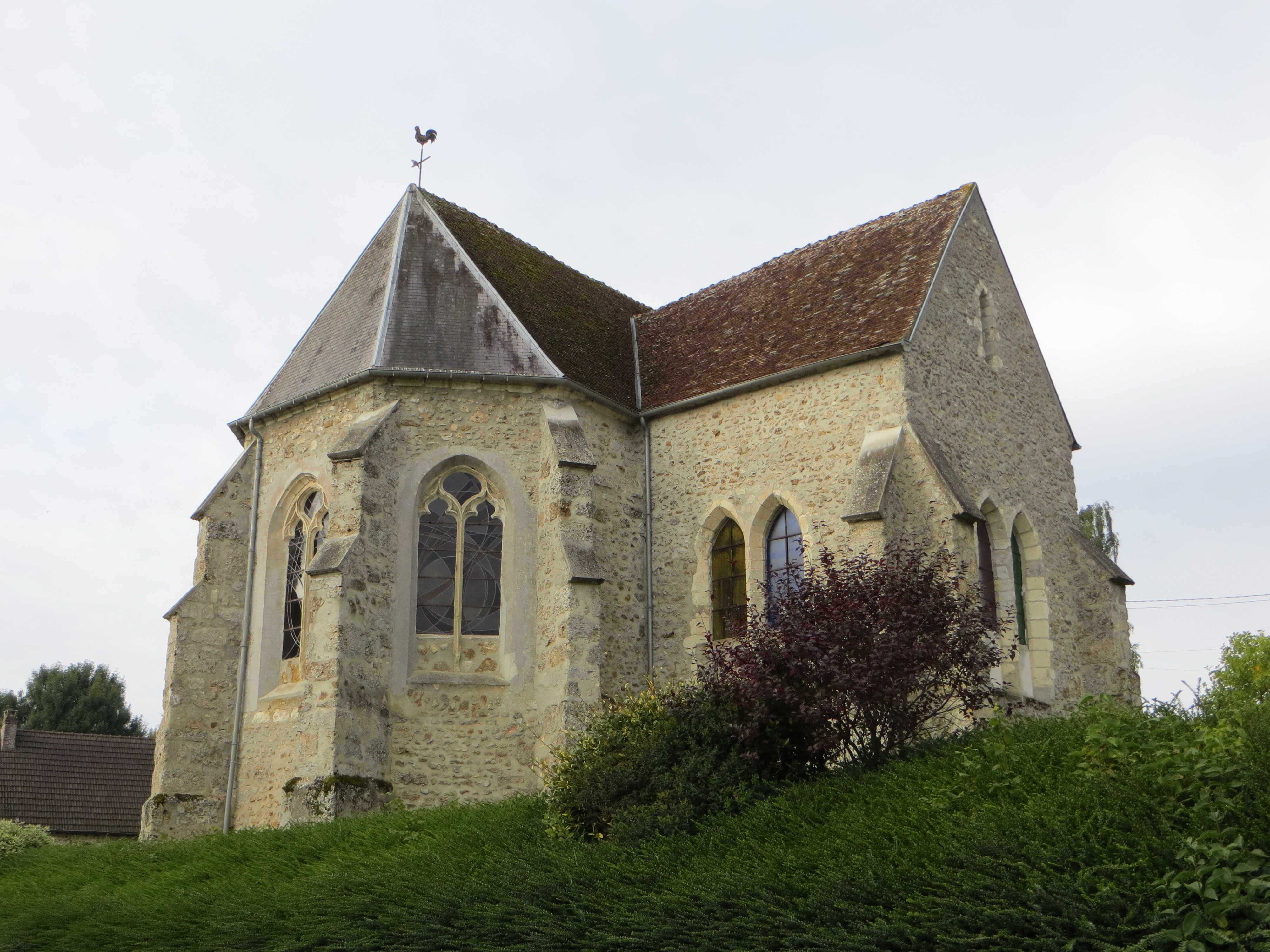 Vue générale de l'église